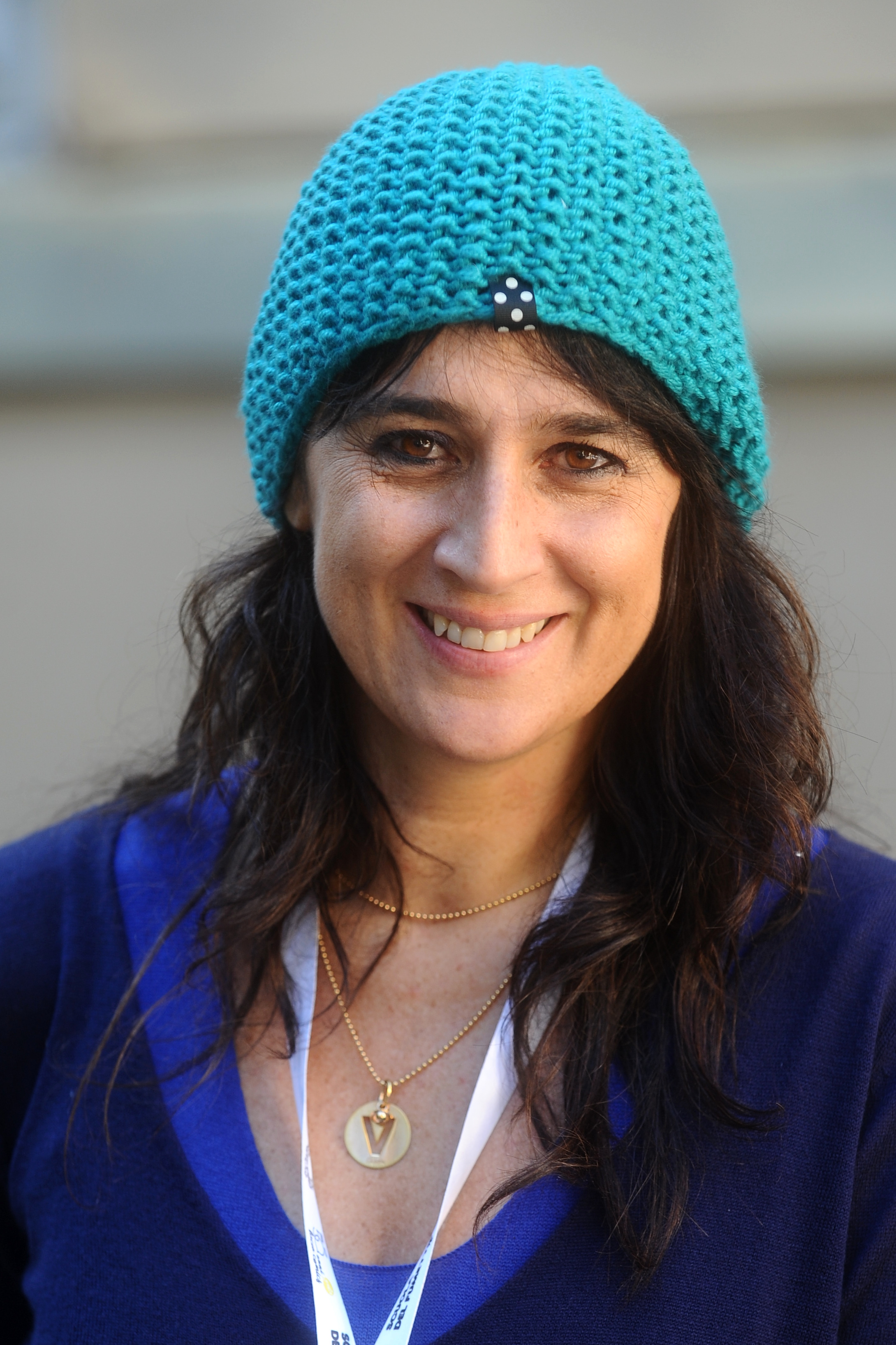 Valentina De Poli a Lucca Comics & Games 2016. Cortile di Palazzo Ducale.